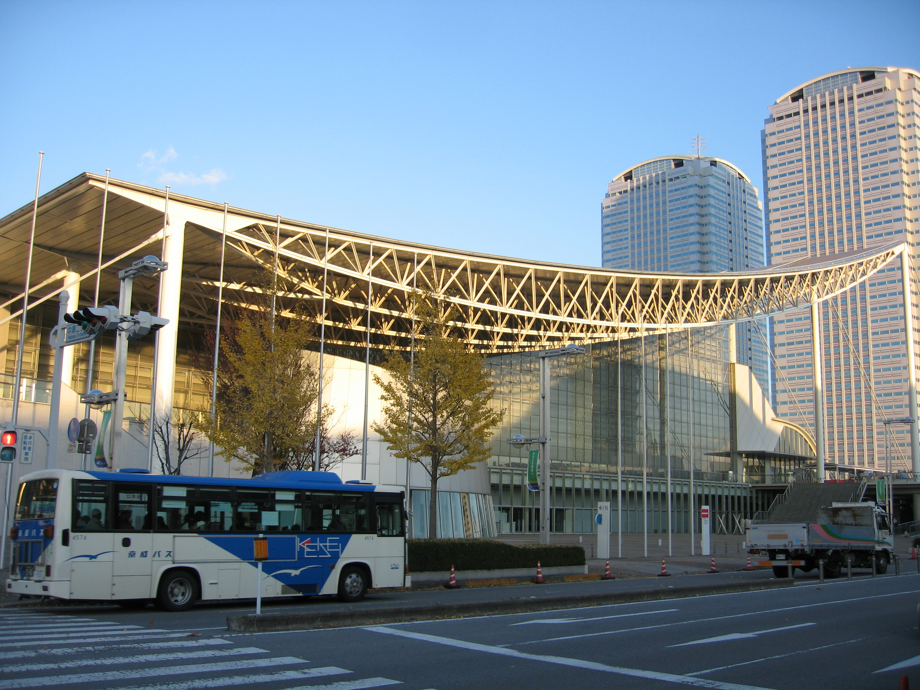 Makuhari Messe in Chiba, Japan